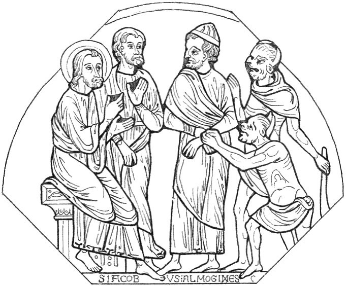 Monographie de la cathédrale de Chartres. Atlas.